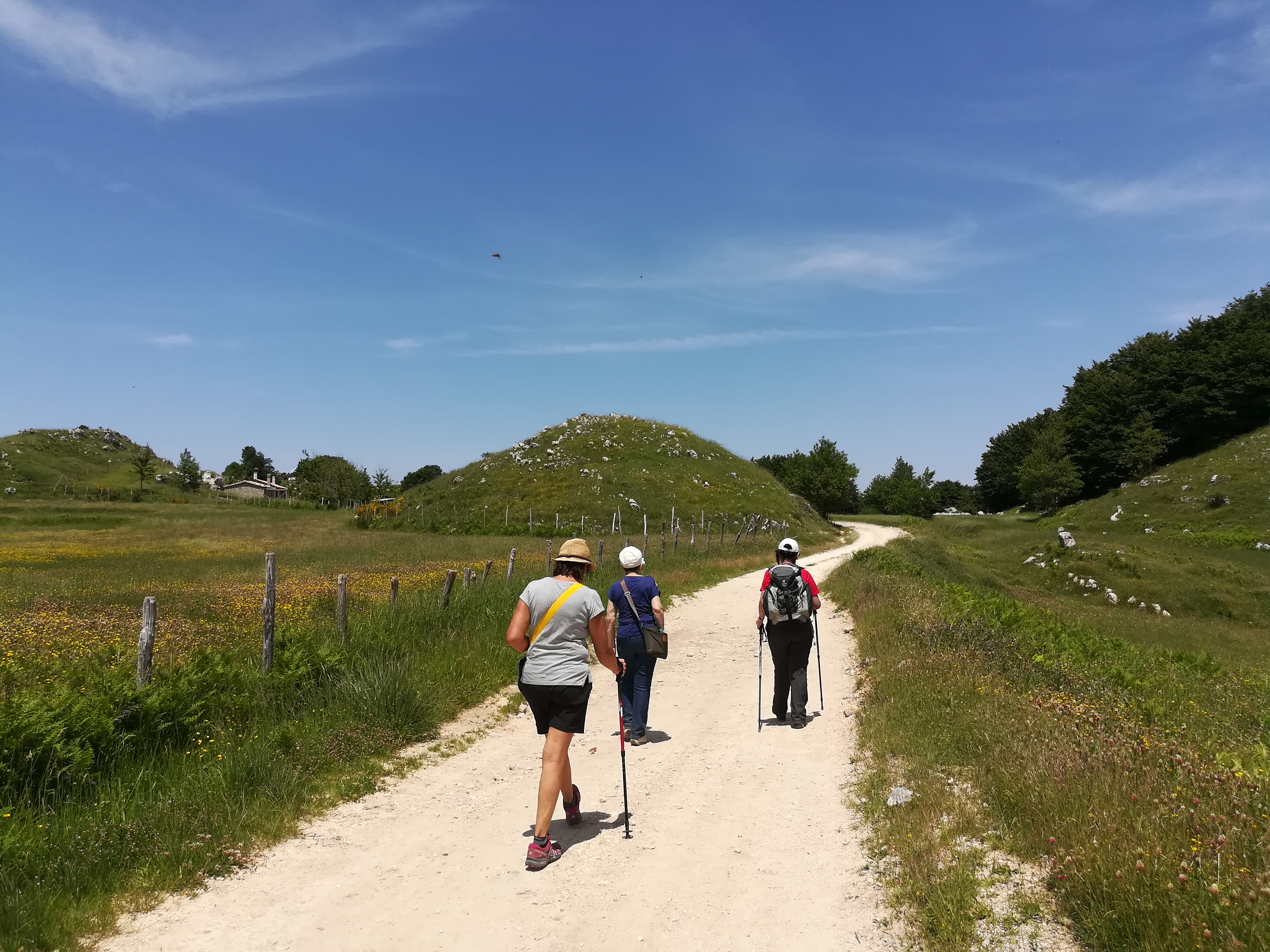 Pellegrini sul Cammino di San Francesco di Paola, lungo la tappa tra San Fili e Cerisano